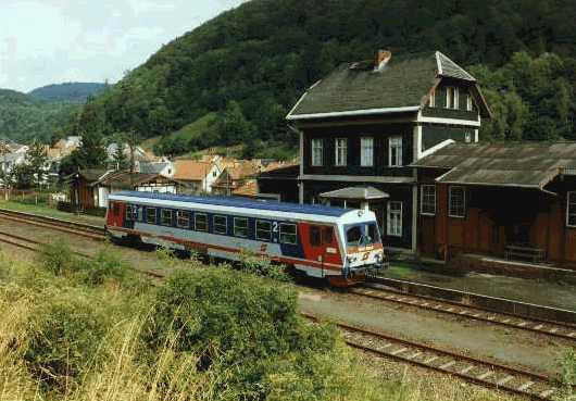 Sonderfahrt einer privaten Eisenbahngesellschaft, die die Strecke Schmalkladen - Brotterode übernehmen wollte, aber damit scheiterte.